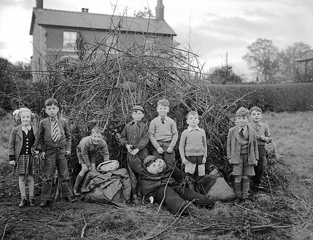 Teitl Cymraeg/Welsh title: Noson tân gwyllt yn y Waun. Ffotograffydd/Photographer: Geoff Charles (1909-2002) Cyfrwng/Medium: Negydd ffilm / Film negative Cyfeiriad/Reference: (gch07143) Rhif cofnod / Record no.: 3368059 Rhagor o wybodaeth am gasgliad Geoff Charles yn Llyfrgell Genedlaethol Cymru More information about the Geoff Charles Collection at the National Library of Wales